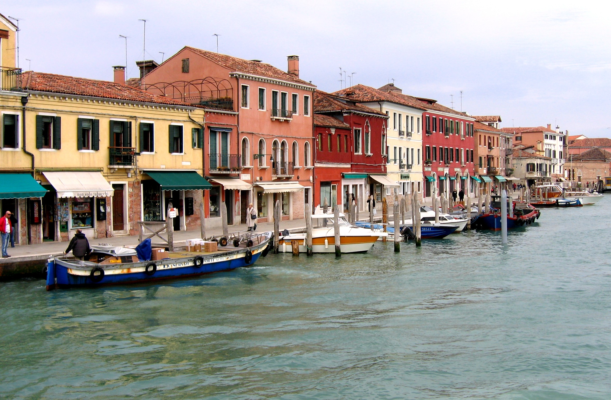 Murano